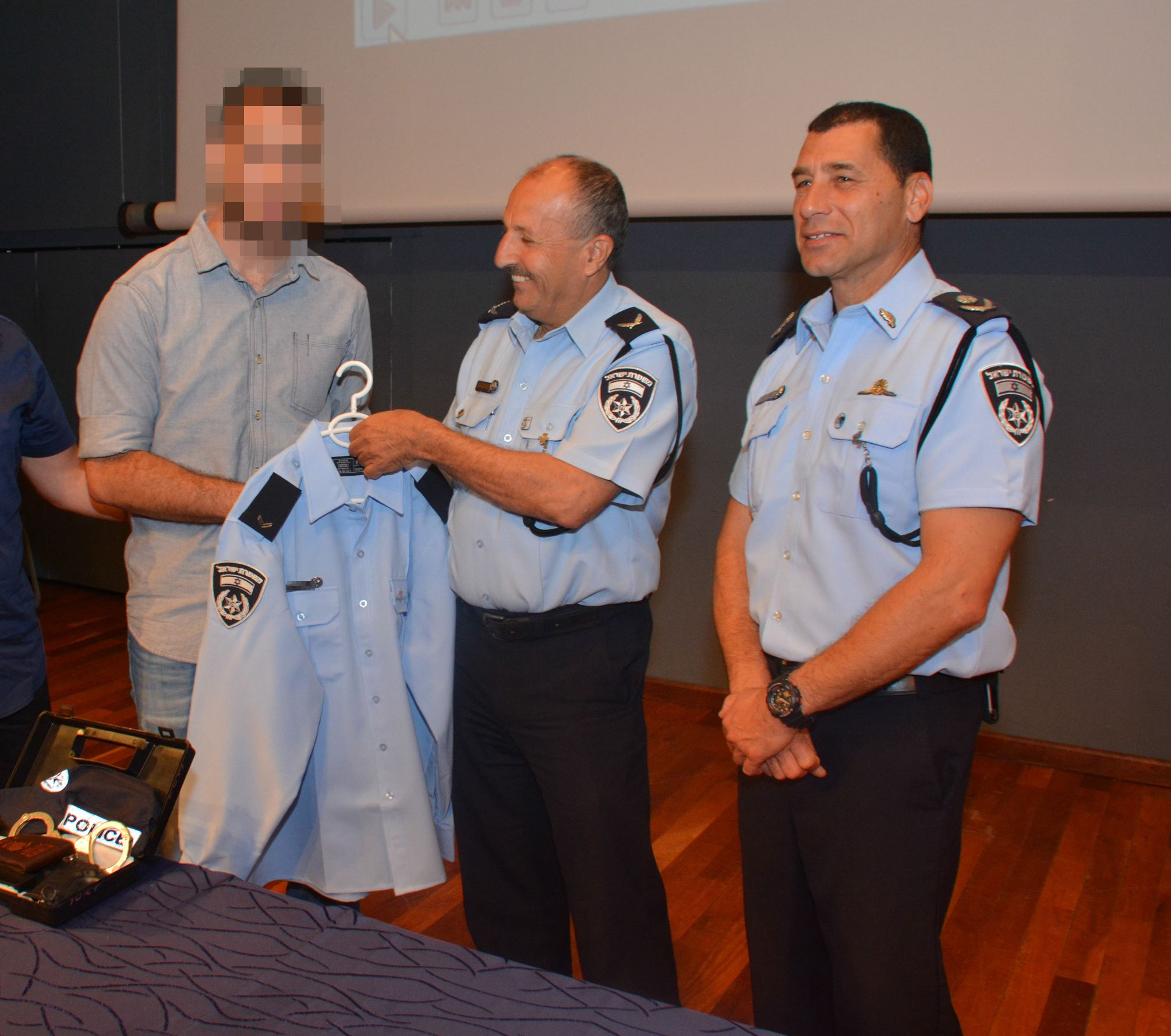 זהר דביר וג'מאל חכרוש